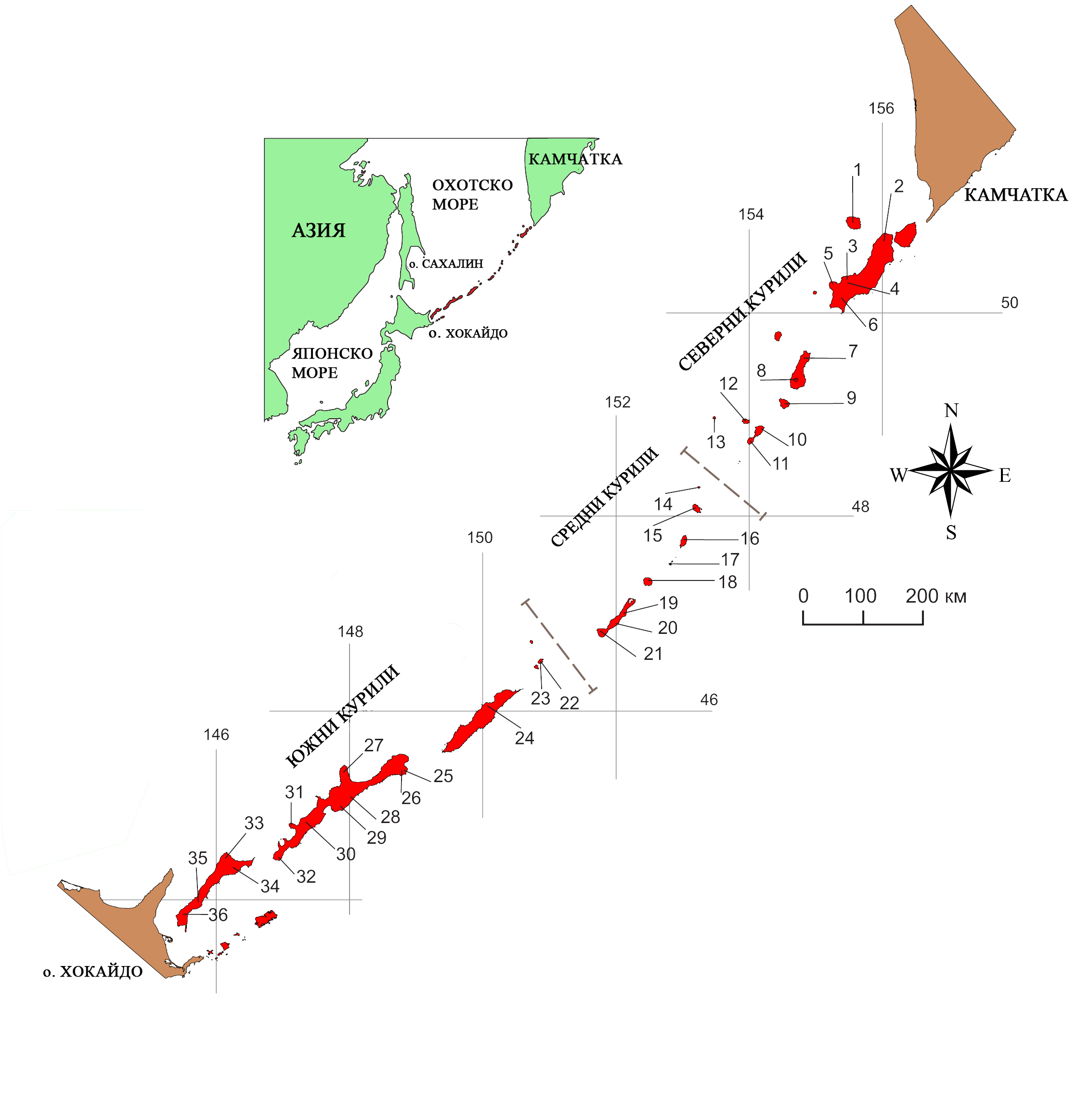 Курилски вулкани 1. Алаид, 2. Ебеко, 3. Чикурачки, 4. Вулкан на Татаринов, 5. Фуса, 6. Вулкан на Карпински, 7. Немо, 8. Вулкан на Креницин, 9. Вулкан на Севергин, 10. Синарка, 11. Кунтоминтар, 12. Екарма, 13. Чиринкотан, 14. Райкоке, 15. Вулкан на Саричев, 16. Расшуа, 17. Ушишир, 18. Вулкан на Палас, 19. Прево, 20. Вулкан на Заварицки, 21. Горяшчая сопка, 22. Вулкан на Чьорни, 23. Сноу, 24. Вулкан на Берг, 25. Кудрявий, 26. Менший брат, 27. Групата Чирип и Богдан Хмелницки, 28. Вулкан на Барански, 29. Иван Грозни, 30. Стокап, 31. Атсонупури, 32. Берутарубе, 33. Руруй, 34. Тятя, 35. Вулкан на Менделеев, 36. Вулкан на Головнин